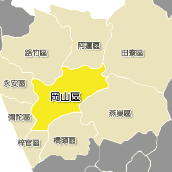 高雄市岡山區相對位置。